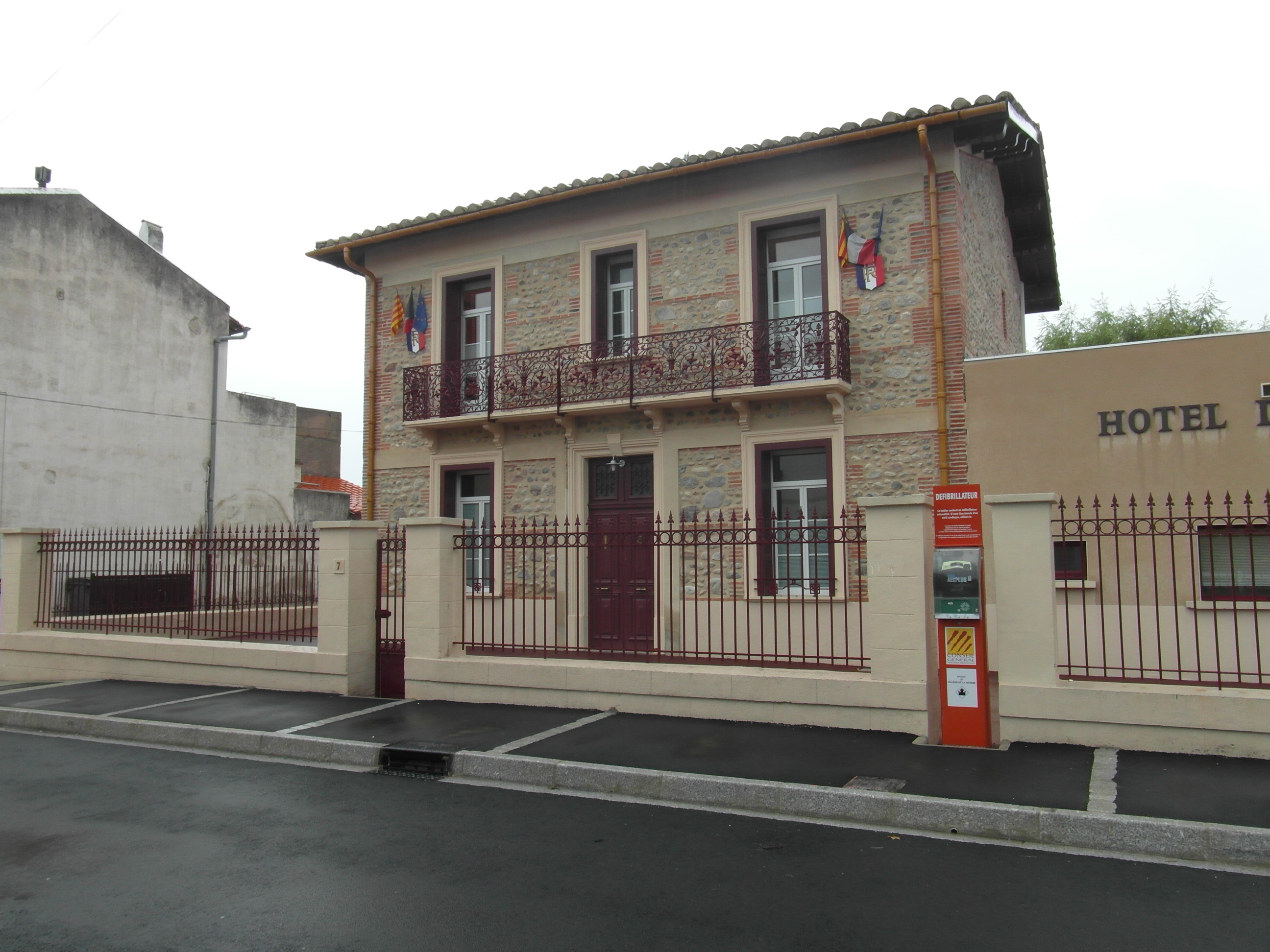 Mairie de Villeneuve-la-Rivière